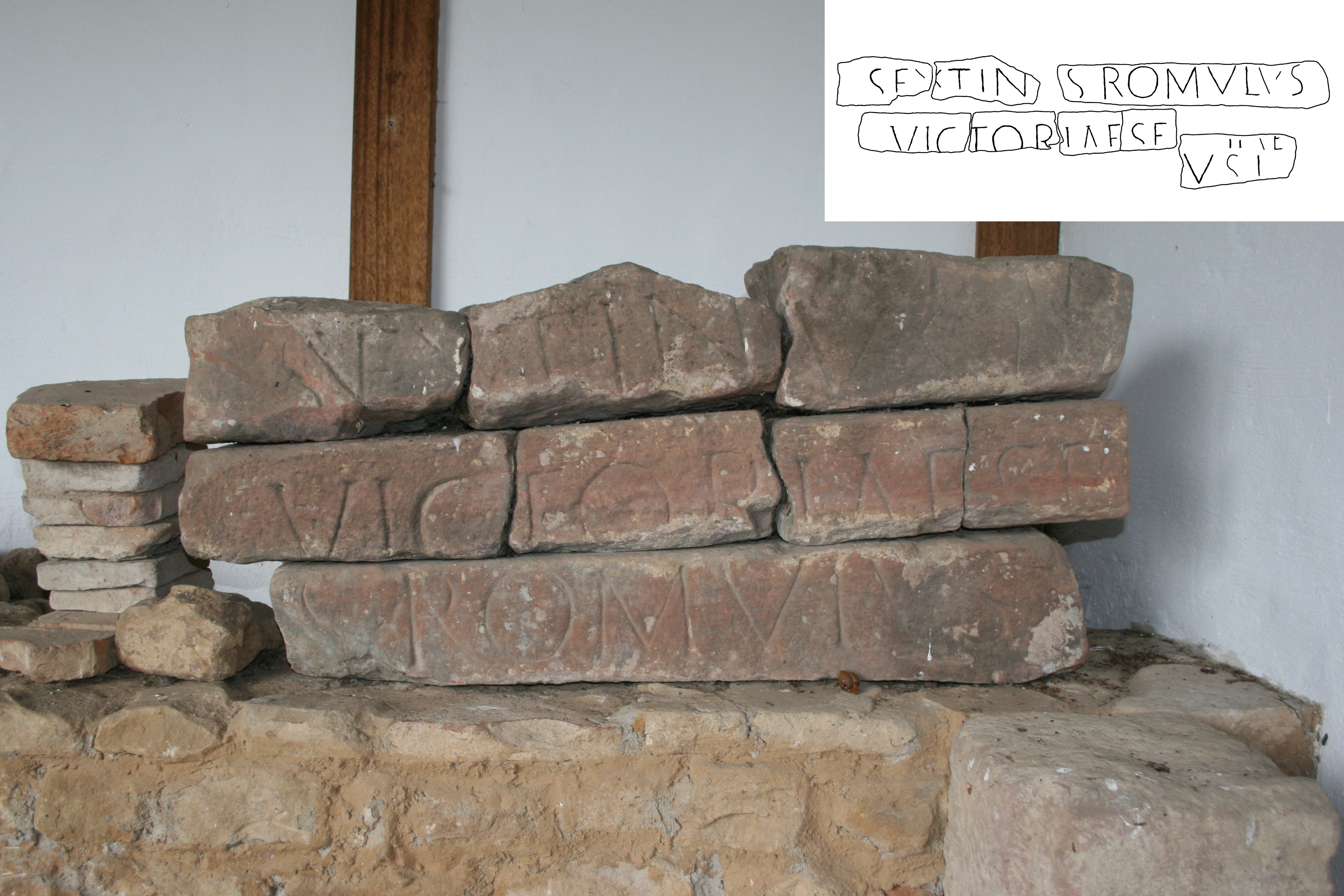 Römische Inschrift, gefunden 1828 in der Kirche von Pfeffingen (Weiler bei Bad Dürkheim-Ungstein). Ausstellung im Kelterhaus der römischen Villa Weilberg. (siehe F. Schumann: Römervilla Weilberg, Bad Dürkheim 2006, S. 51; CIL XIII, 06139 (4, p 89). Falsche Reihenfolge der Steine, die Zeichnung oben rechts entspricht der eigentlichen Anordnung der Fragmente.